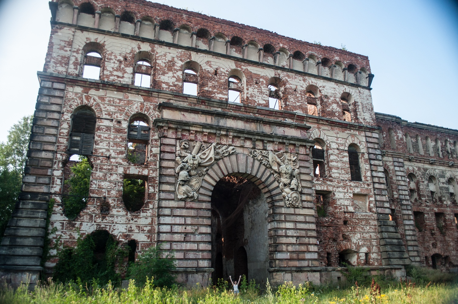 Nowy Dwór Mazowiecki Modlin - spichrz (ruina), 1844